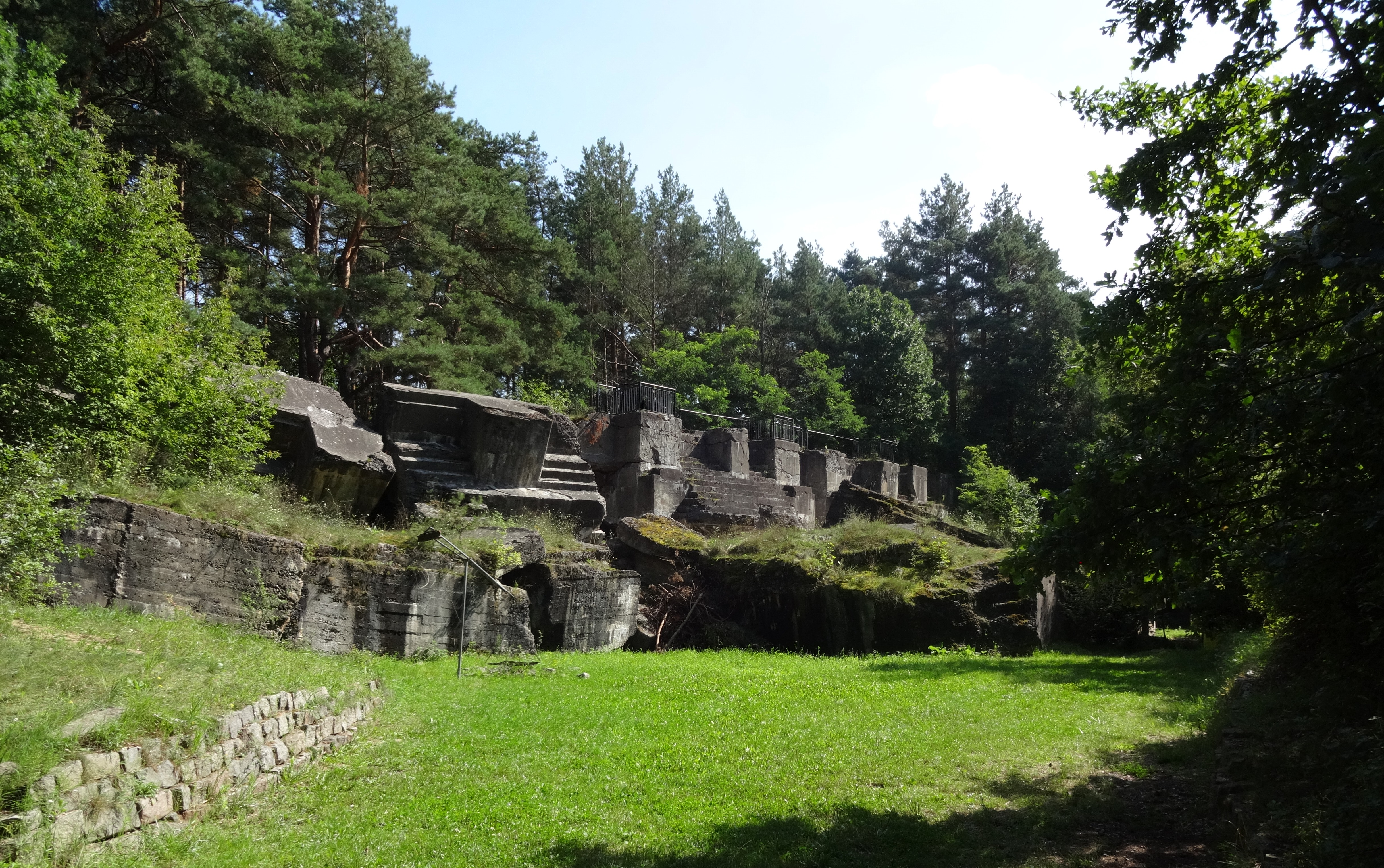 Widok ogólny na ruiny fortu